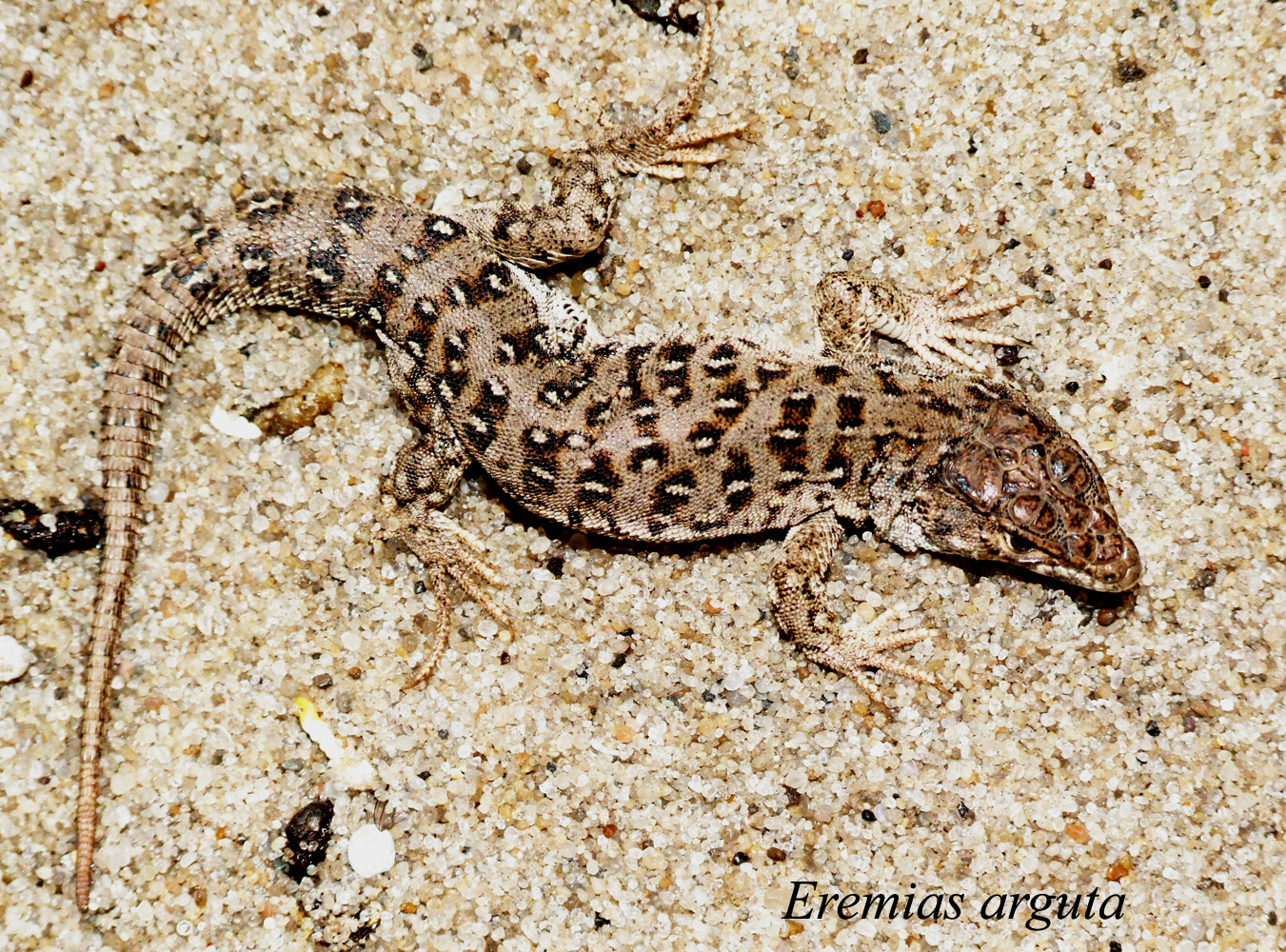 Eremias arguta from Ukraine. ящірка піщана (Eremias arguta) з піщаних арен Придінців'я